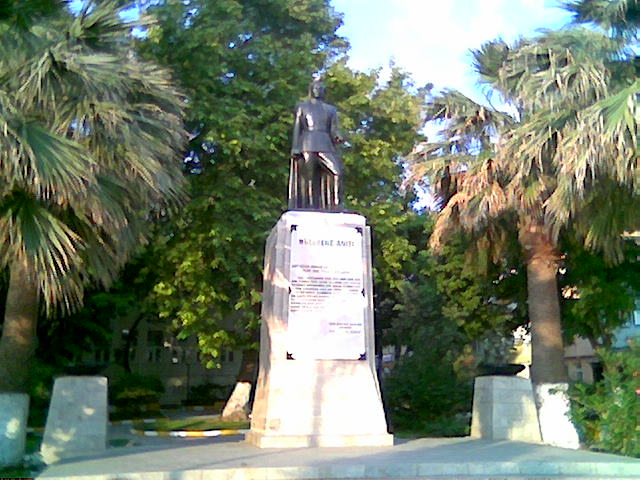 Mütareke Anıtı